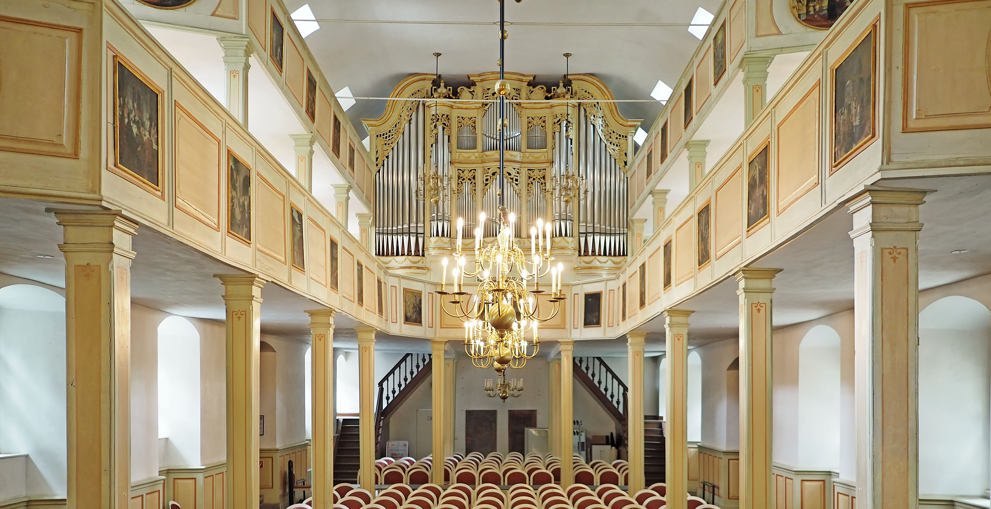 Schloss Bad Homburg - Schlosskirche mit Orgel